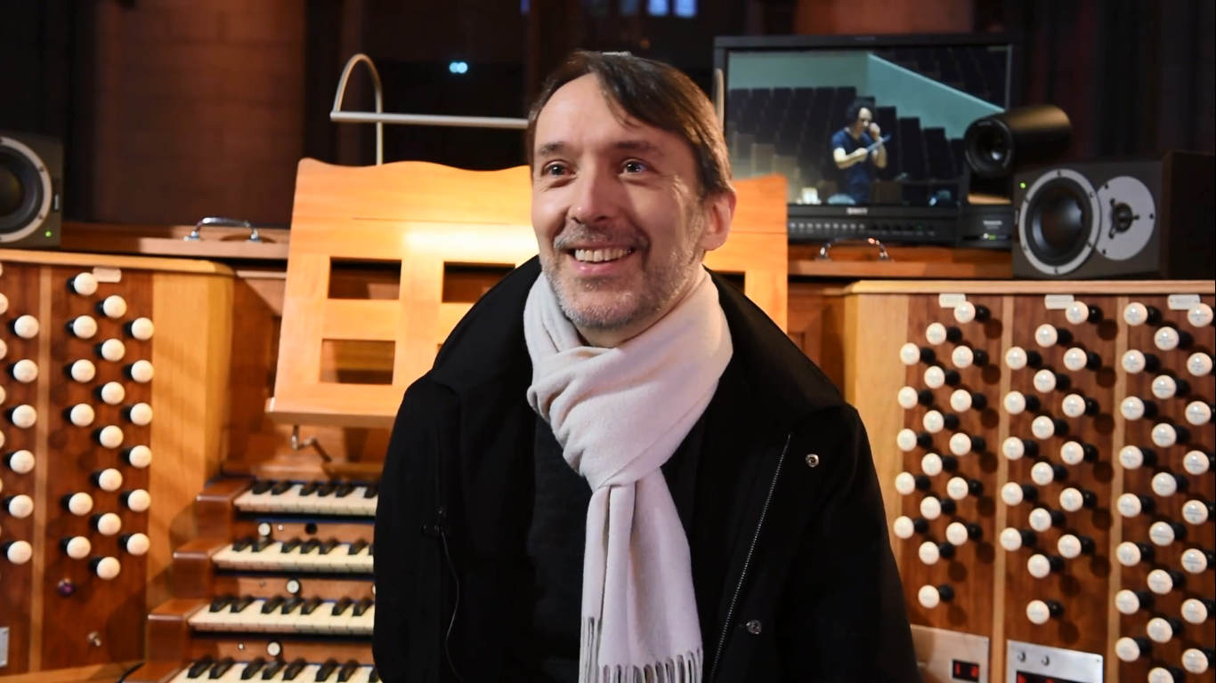 Olivier Latry au Grand Orgue de la Cathédrale Notre Dame de La Treille